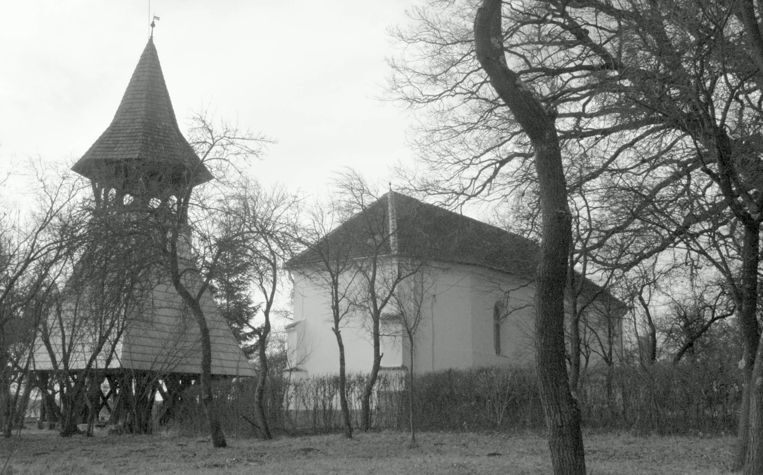 Ansamblul bisericii unitariene